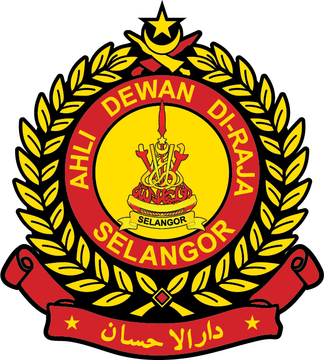 Ahli Dewan Diraja Selangor